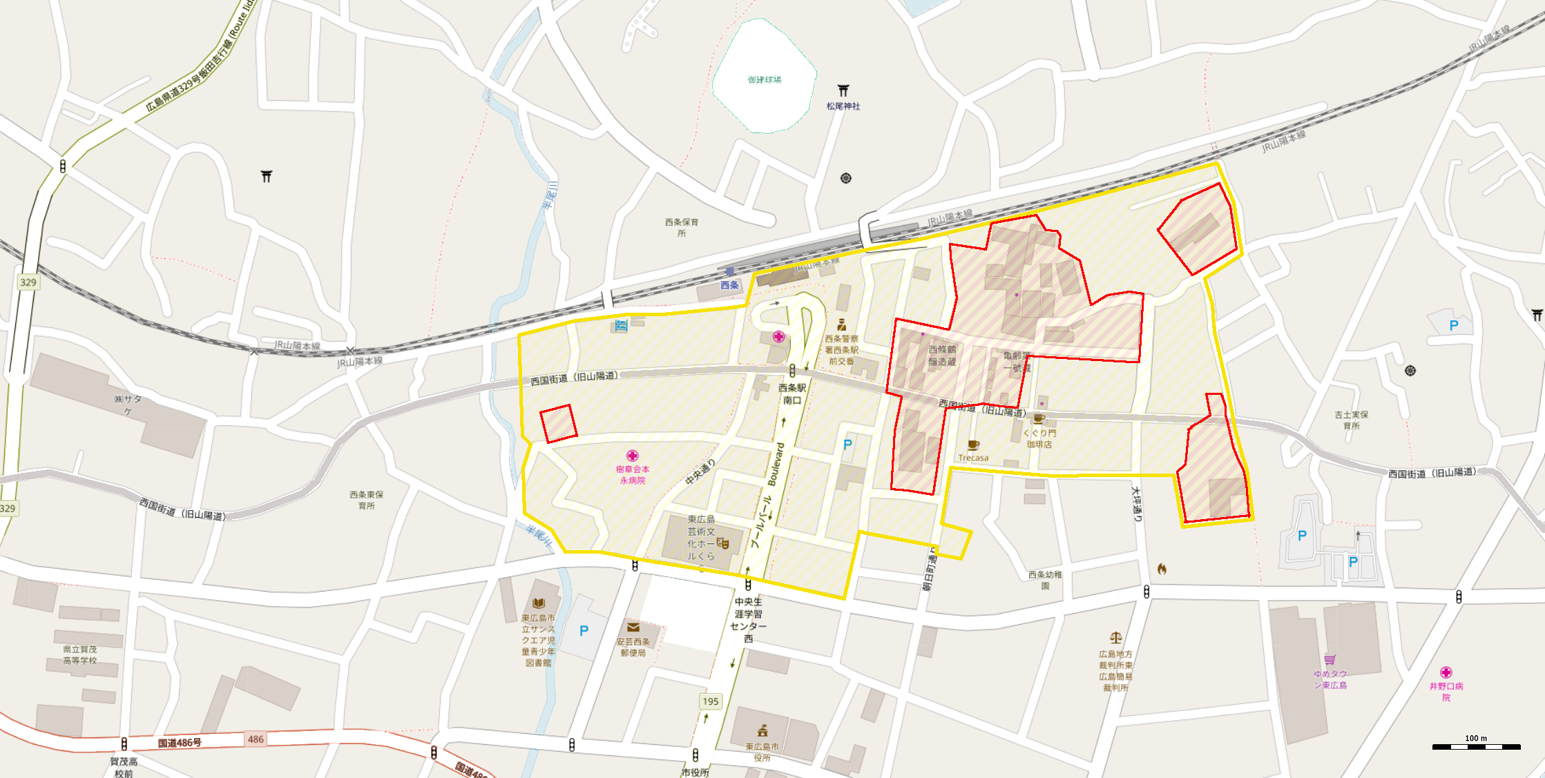 日本遺産「西条の酒造施設群」のコアゾーン（赤）とバッファーゾーン（黄） This map may be incomplete, and may contain errors. Don't rely solely on it for navigation.